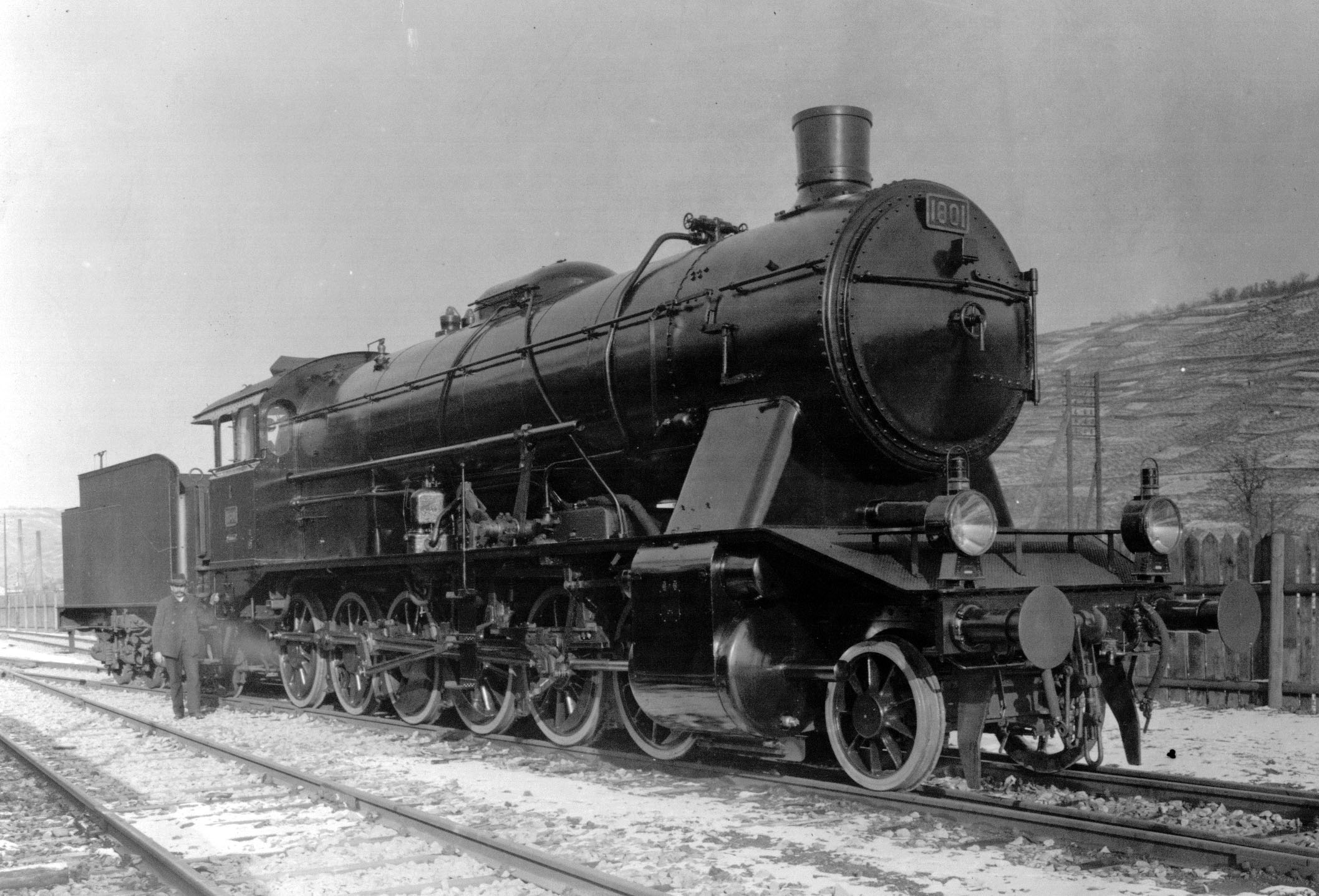 Dampflokomotive Württembergische K.